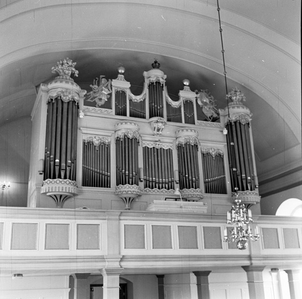 Orgeln, från Kristine K:a i Göteborg. Kategori: (02) OrglarOrgeln, från Kristine K:a i Göteborg.